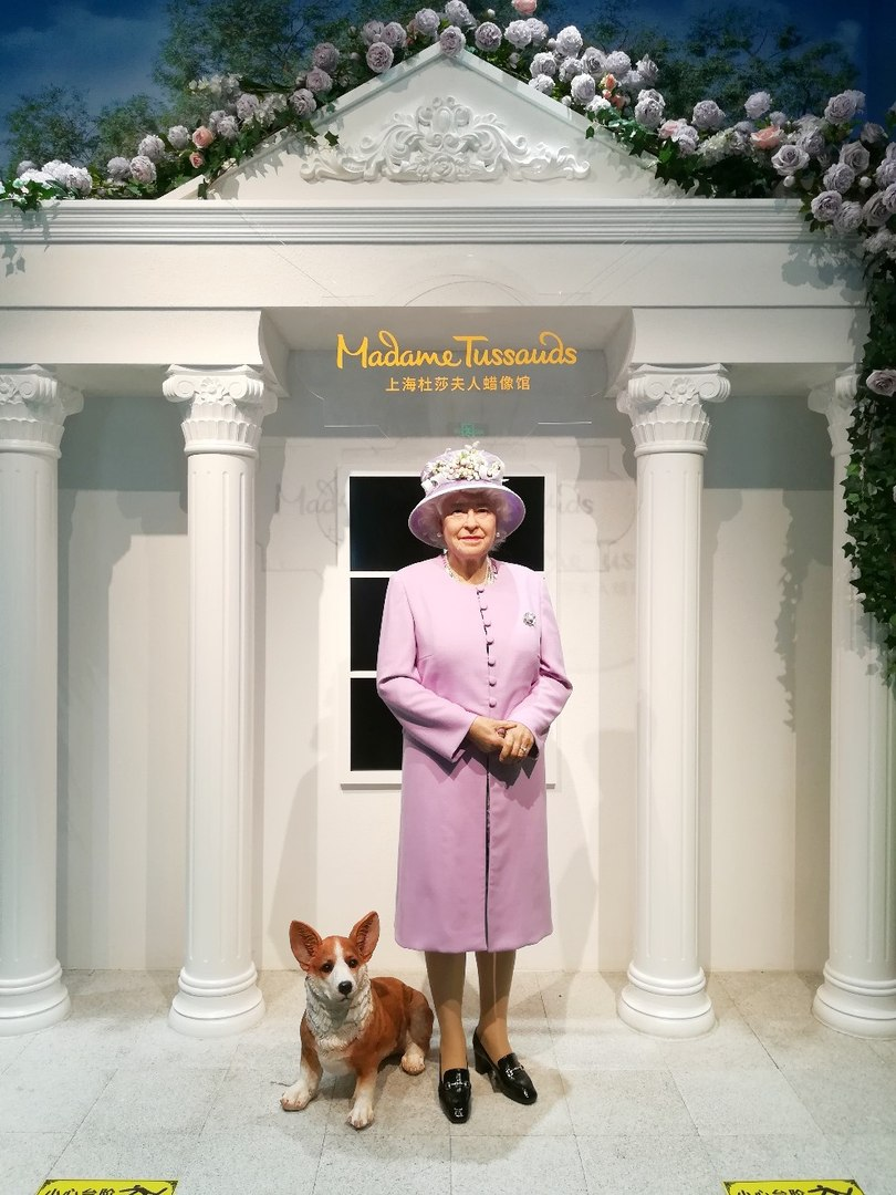 Madame Tussaud's Museum in Shanghai, China